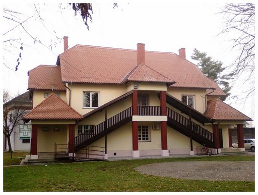 Stara zgrada u Mraclinu kraj Velike Gorice.